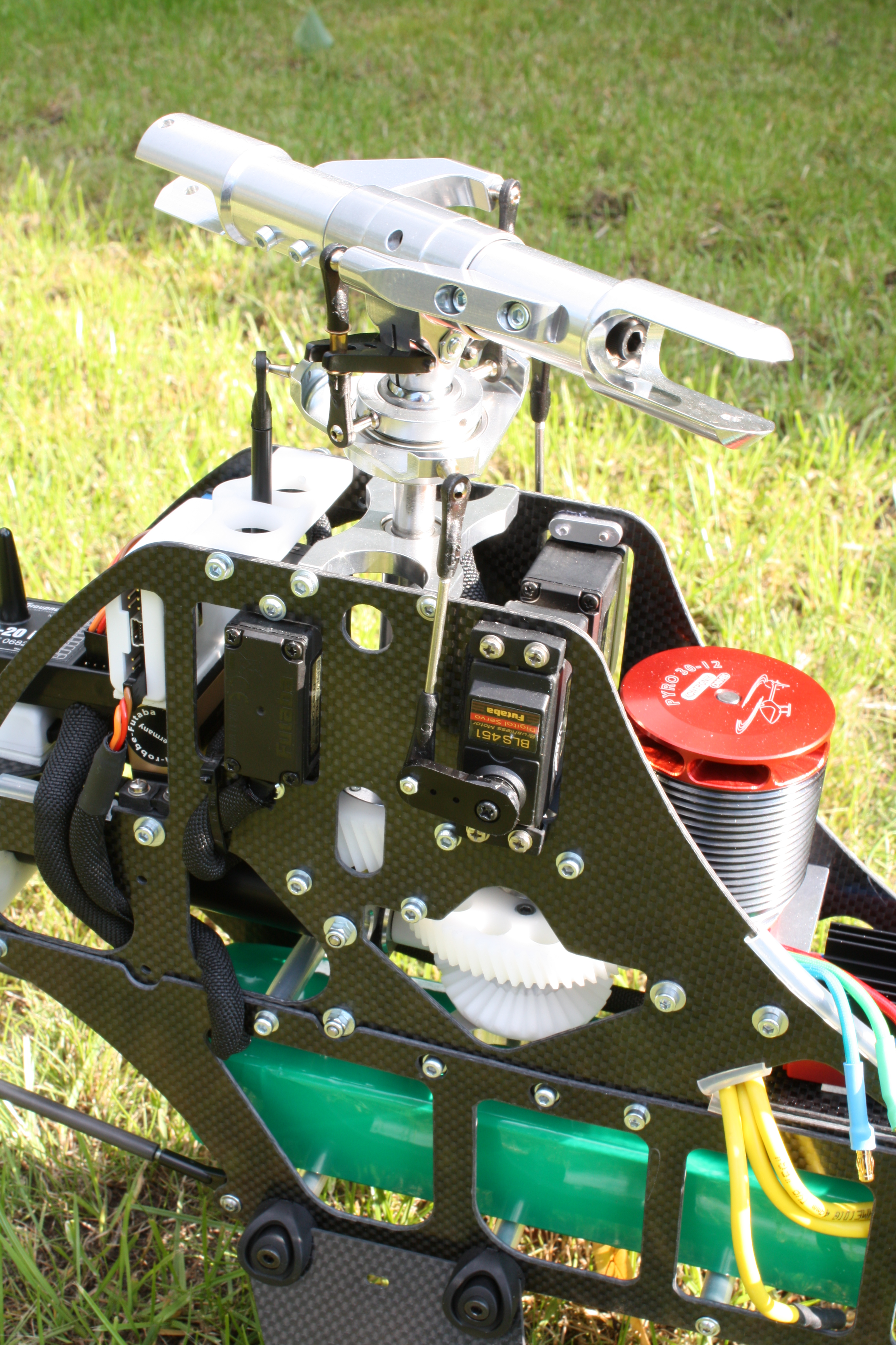 Außenläufer Motor (Outrunner) mit zweistufigem Getriebe und Peripherie eines Henseleit TDR Modellhelikopters